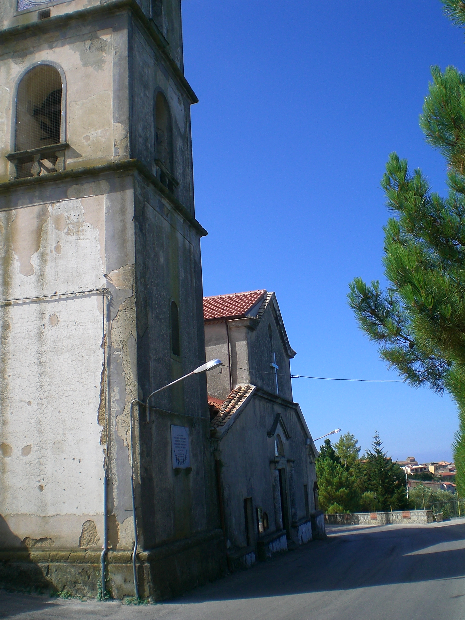 Chiesa di san Mauro a Casal Sottano